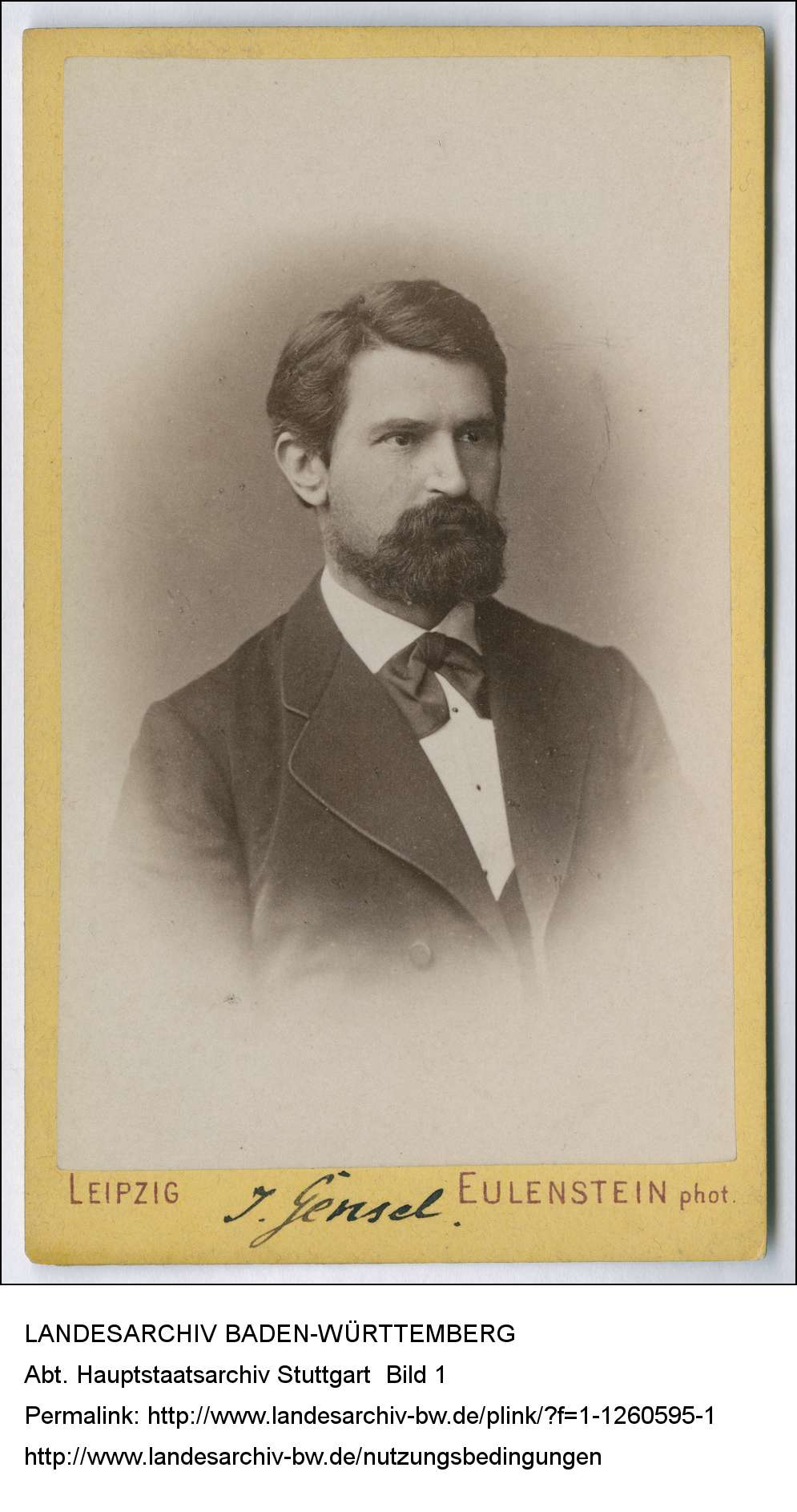 Dr. Julius Gensel - HStA Stuttgart Bild 1 (1-1260595-1)